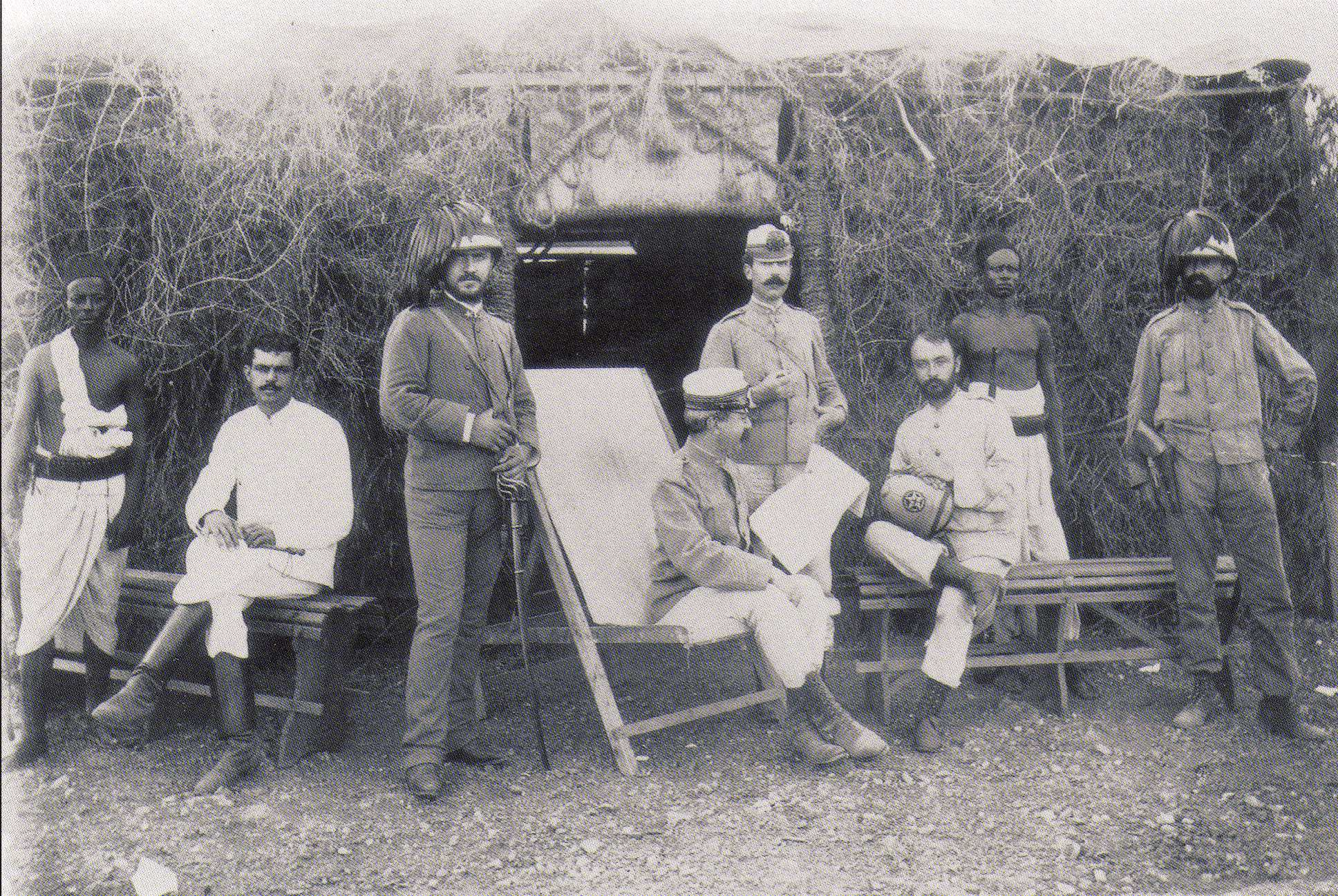 Le colonel Baratieri (assis, casquette blanche, vareuse grise, pantalon blanc) et son état-major, Saati, Erythrée, 1888.